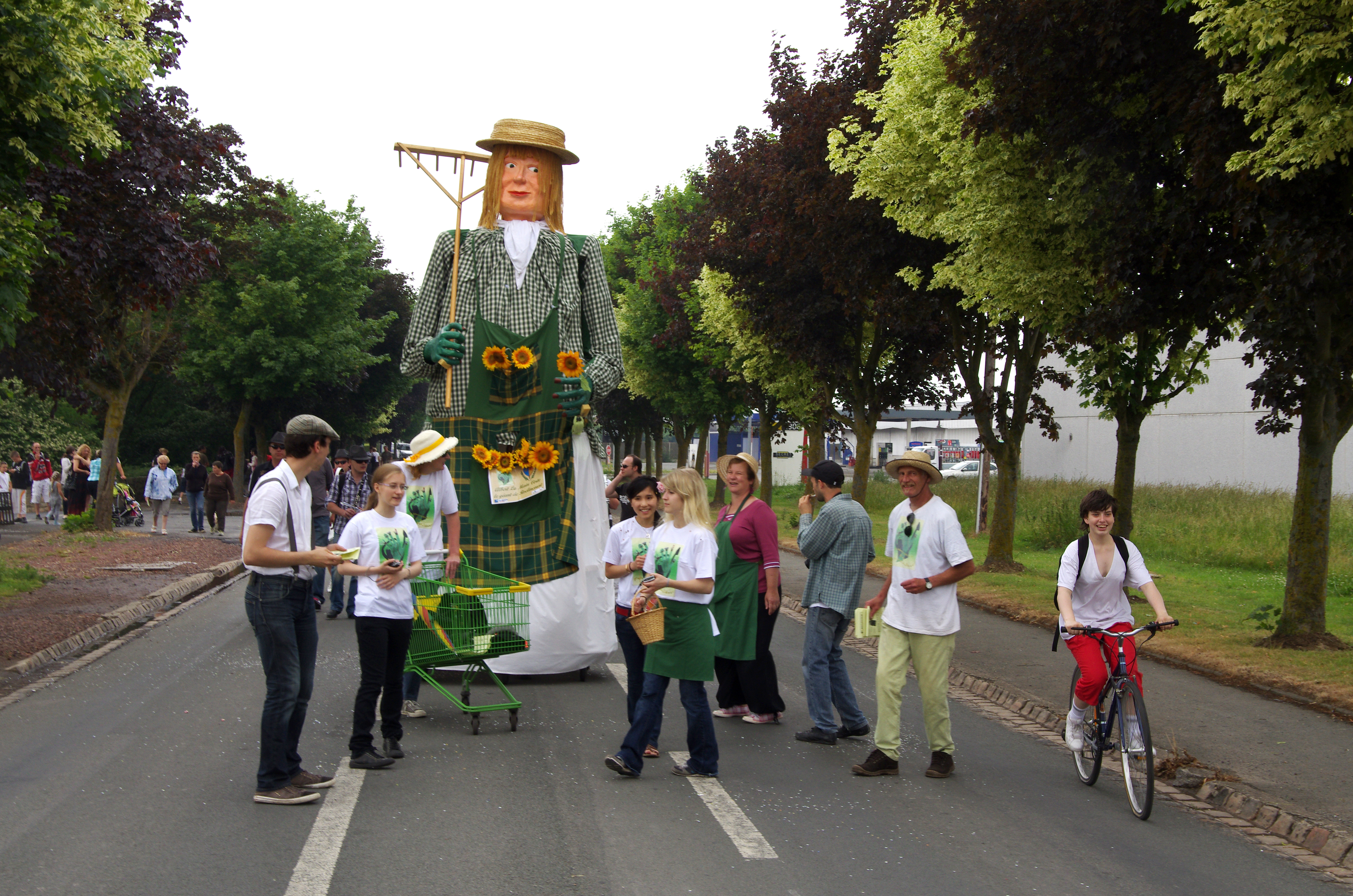 Sainte-Catherine-lès-Arras (Pas-de-Calais, France) - Animation festive avec défilé de géants, un dimanche de juin. Le départ a eu lieu route de Béthune, depuis le parking du supermarché "Intermarché". Le géant Albert la main verte, suivi d'un groupe de musiciens, ferme la marche. .